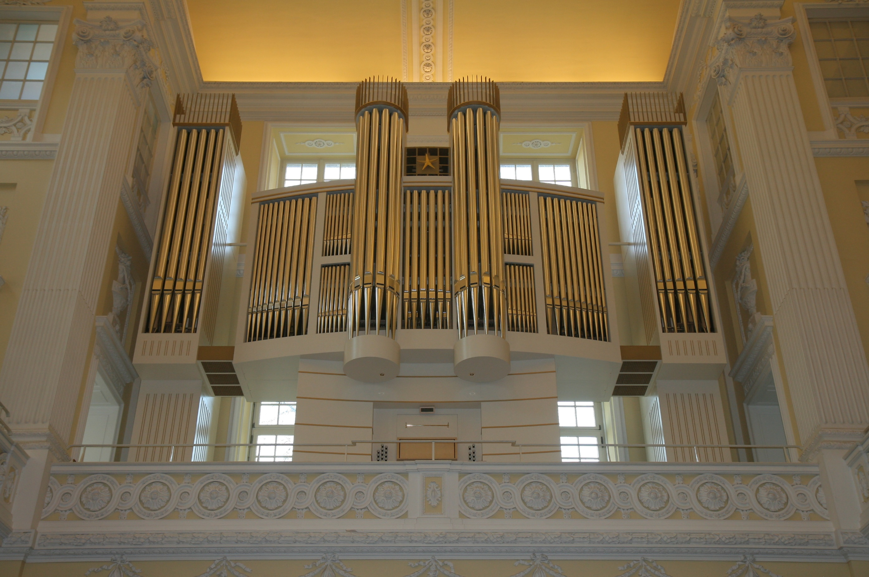 Klais-Orgel in der Schlosskirche (Kurfürstliches Schloss), Bonn-Zentrum, Am Hof 1.